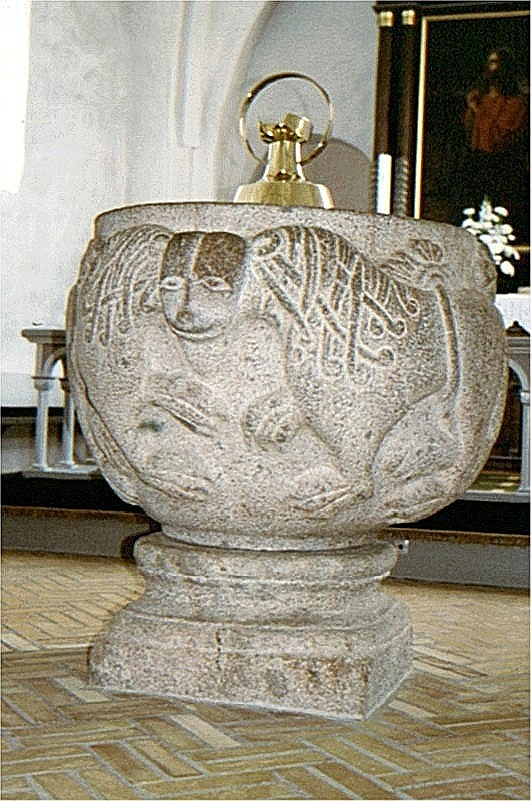 Døbefont Nørre Snede Kirke ligger i Nørre Snede Sogn, i Ikast-Brande Provsti (Århus Stift). Sognet ligger i Ikast-Brande Kommune (tidligere Nørre-Snede Kommune); indtil Kommunalreformen i 1970 lå det i Vrads Herred (Skanderborg Amt). Kirken var i middelalderen viet til Sankt Mikael. Apsis, kor og skib er opført i romansk tid af granitkvadre